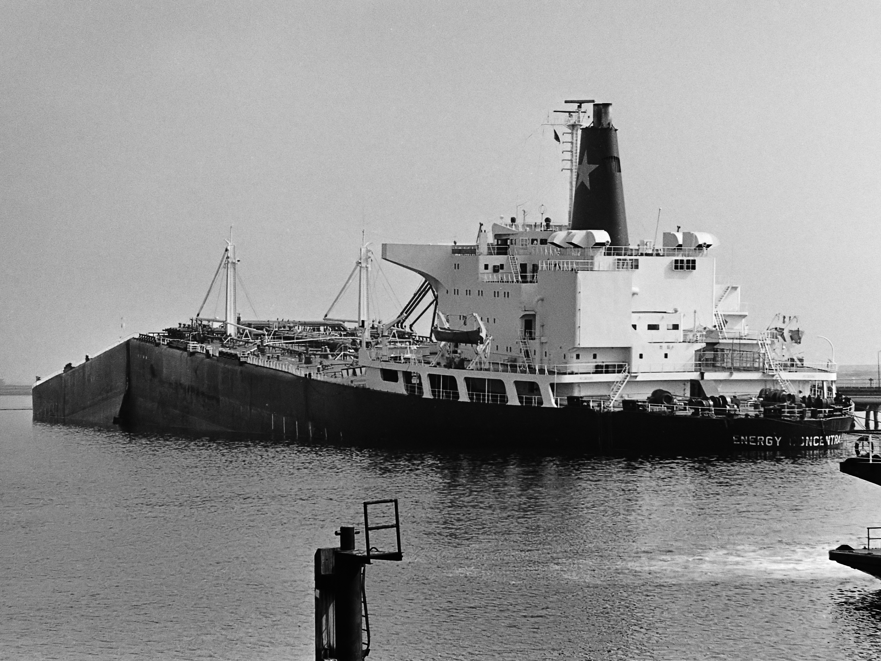 Gebroken tankschip "Energy Concentration" in de 7e Petroleumhaven in Rotterdam 22 juli 1980